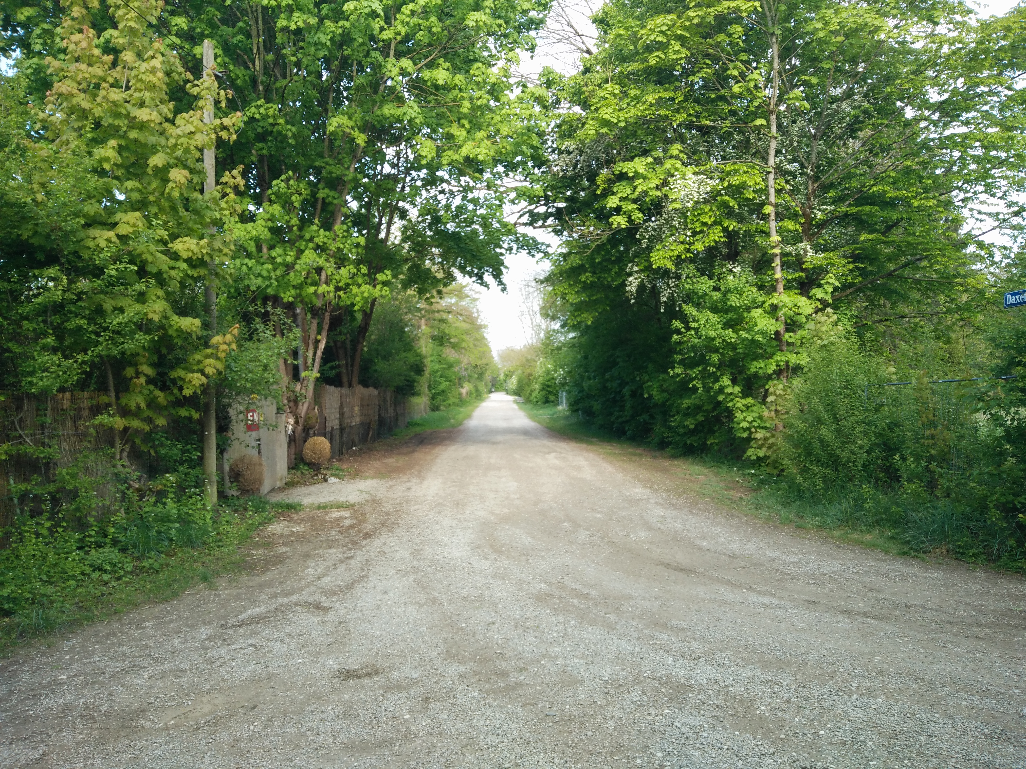 Eggarten Daxet Str